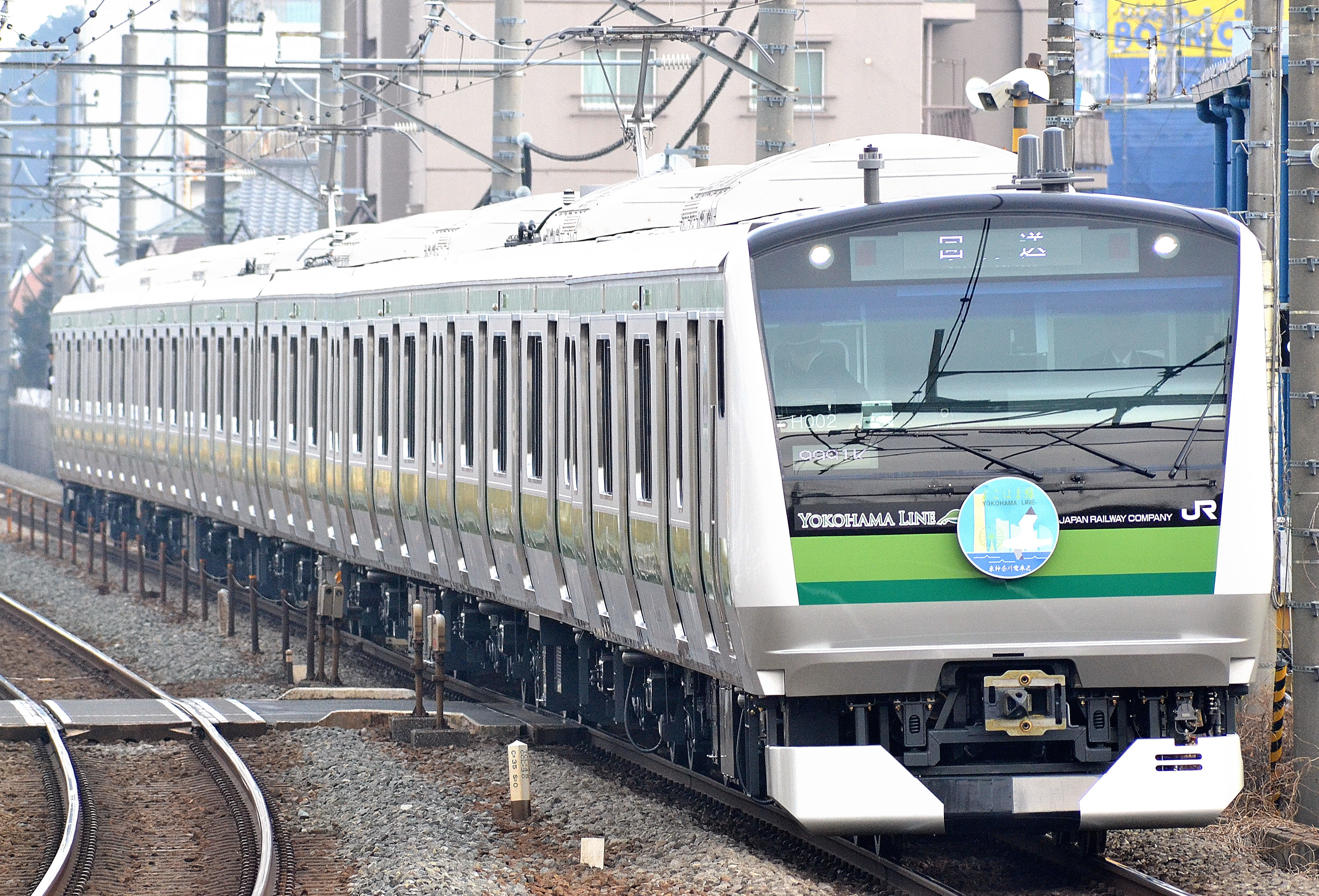 横浜線を走行するE233系6000番台（中山駅ホームから撮影）